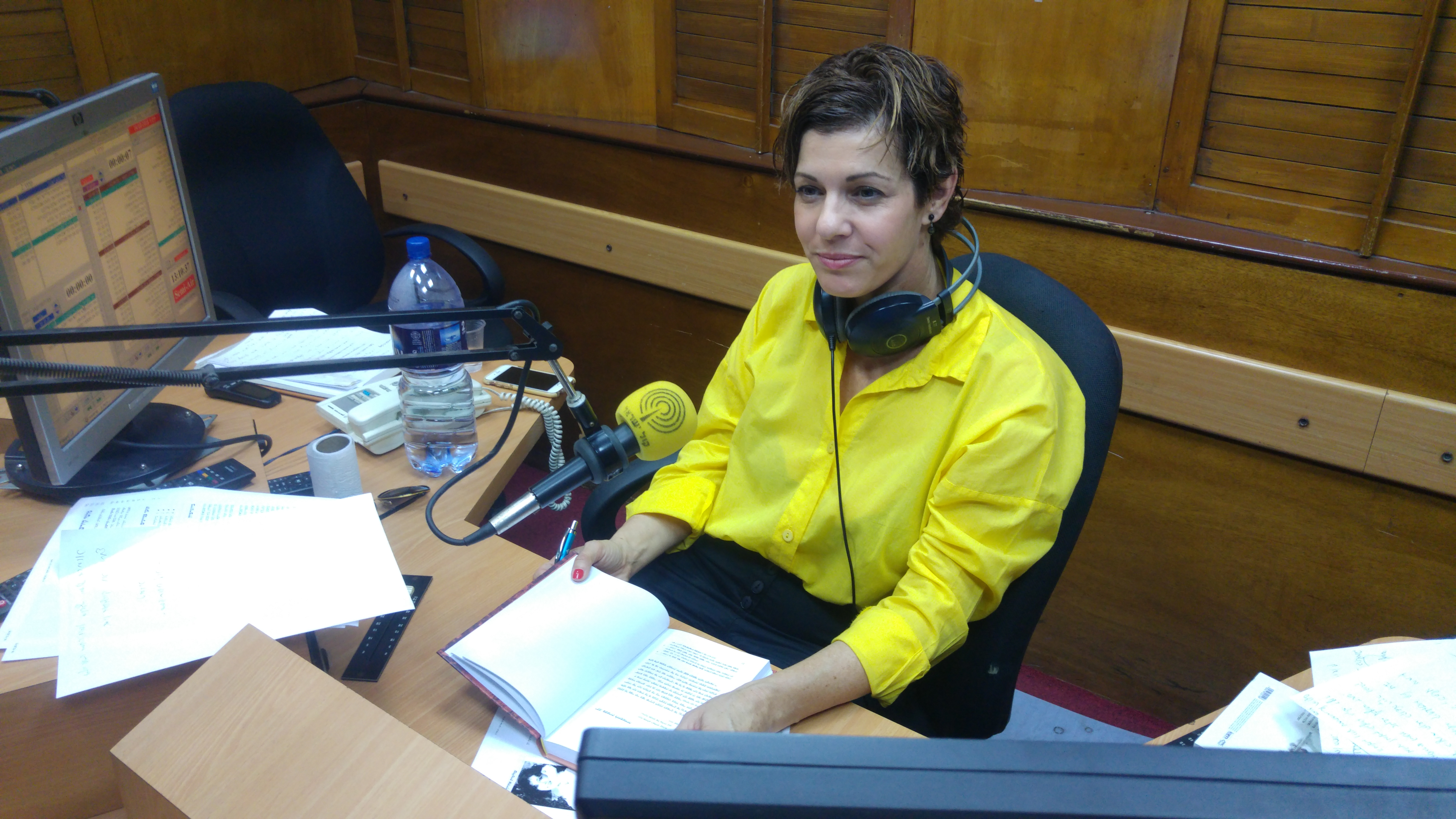 מתחם רשות השידור בתל אביב, ליד הקריה ומתחם שרונה.